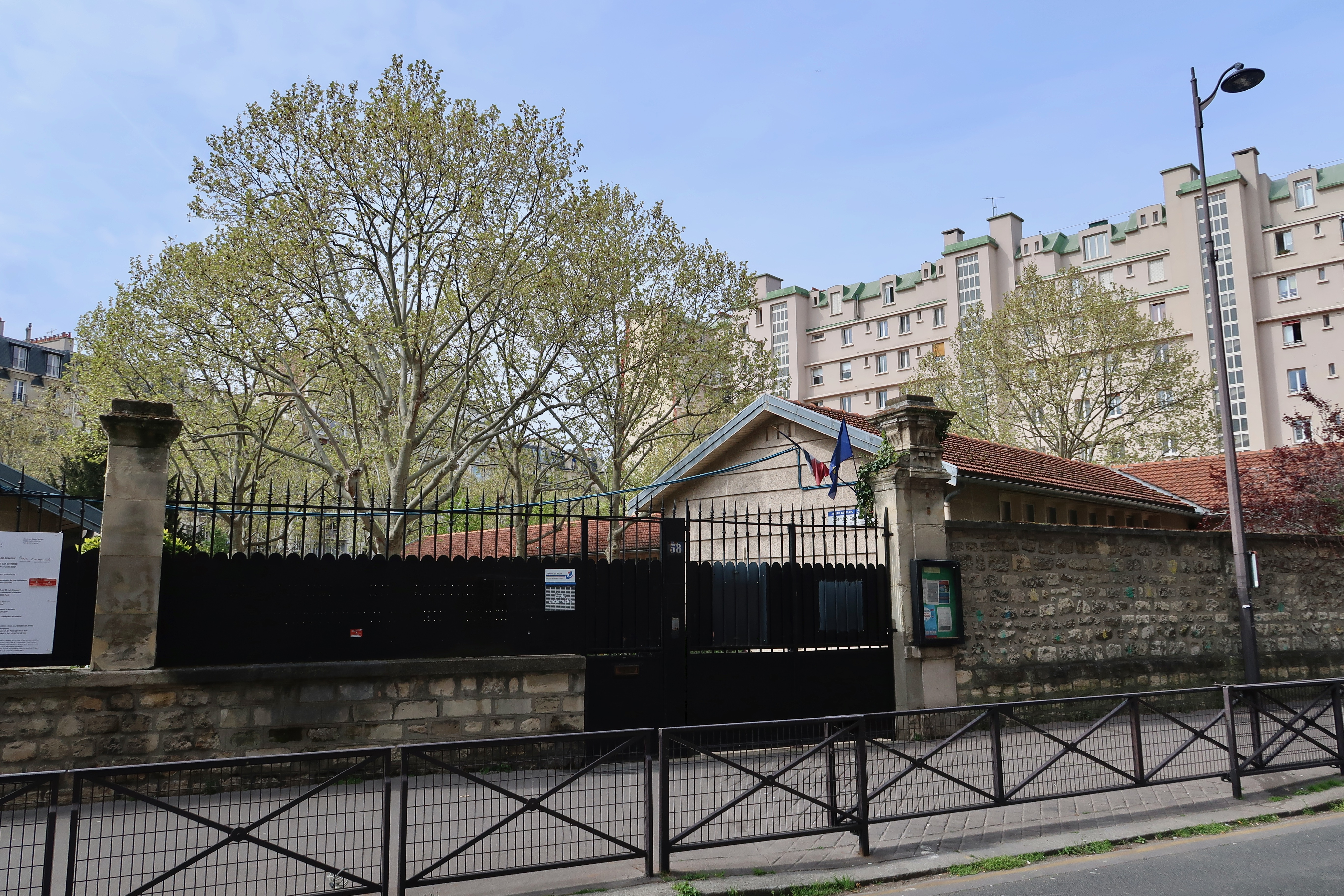 École maternelle, 58 rue Erlanger (Paris, 16e).